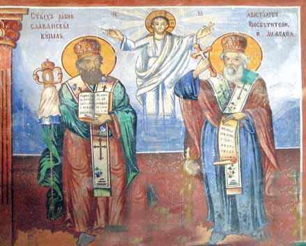 Градешница, црква Св. Никола, св. Кирил и св. Методија, северен ѕид